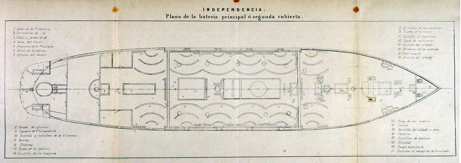 Plano del perfil de la fragata blindada peruana Independencia (Segunda cubierta. Batería principal)